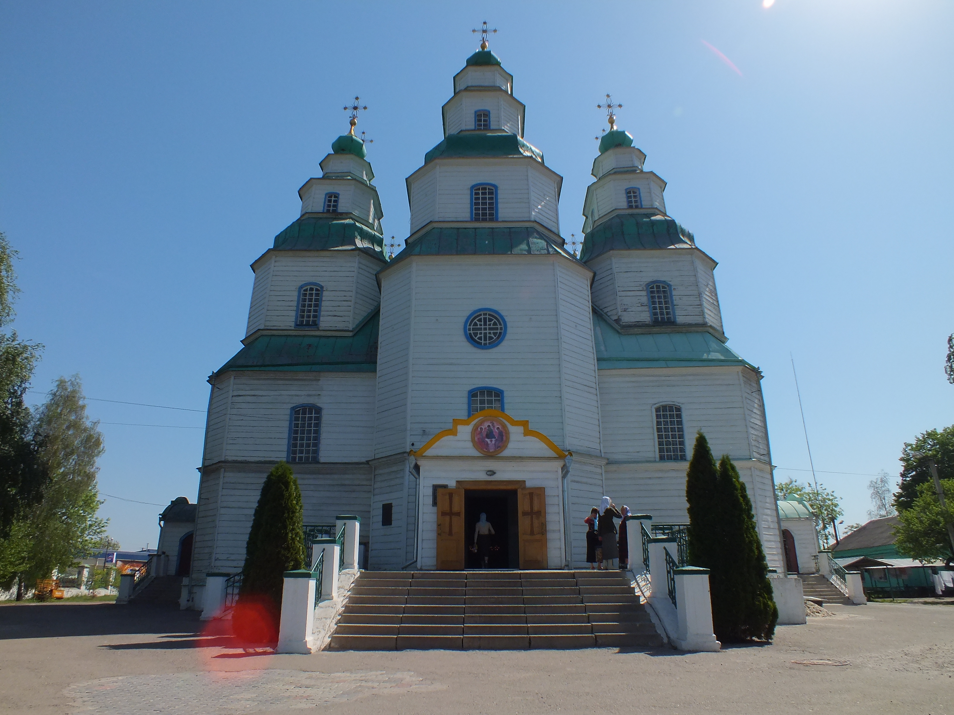 Троїцький собор (дер.), Новомосковськ, пл.Перемоги, 1